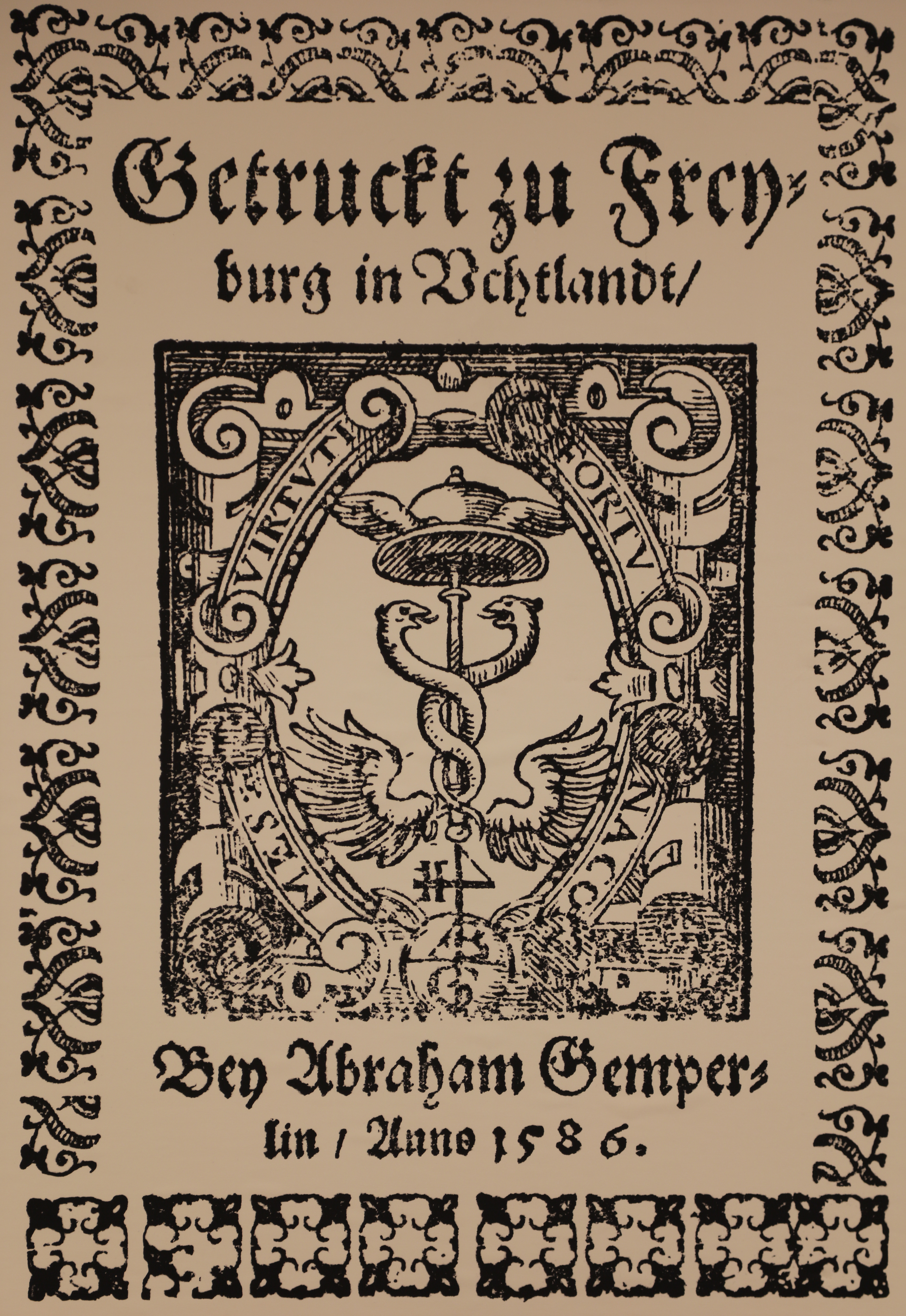 Das Buchdruckzeichen von Abraham Gemperlin.